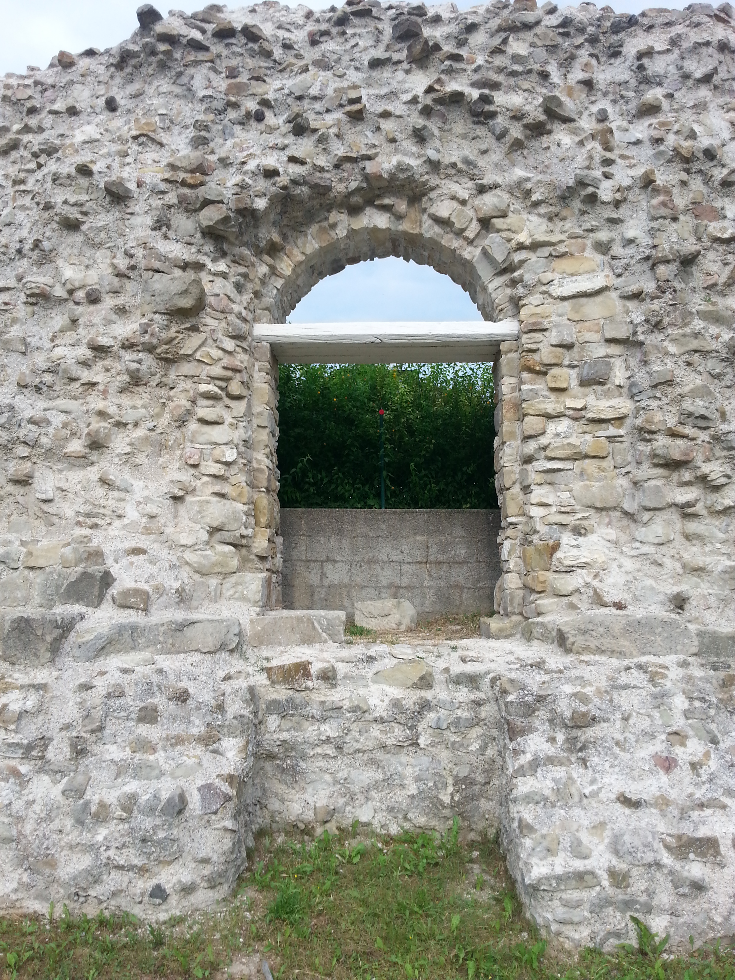 Das auf Originalgröße zurückgebaute Eingangstor (Osten) des spätrömischen Burgus von Zeiselmauer, Niederösterreich.